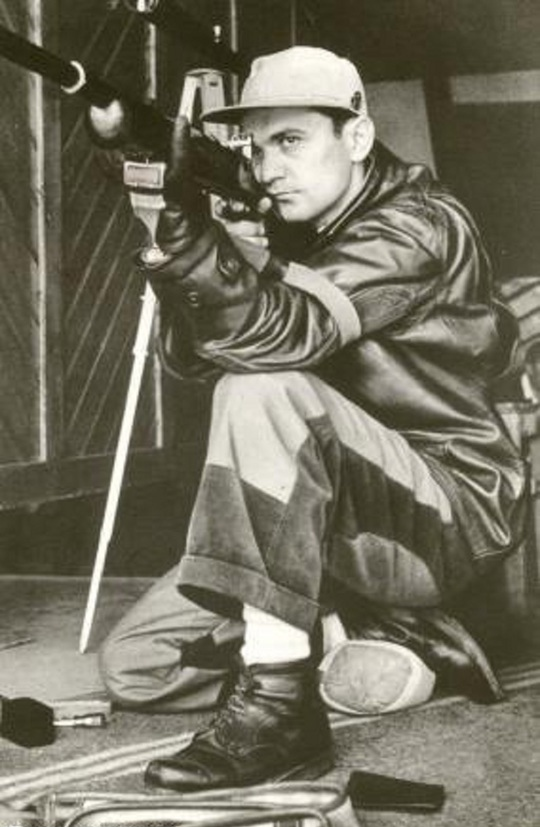 Iosif Sîrbu